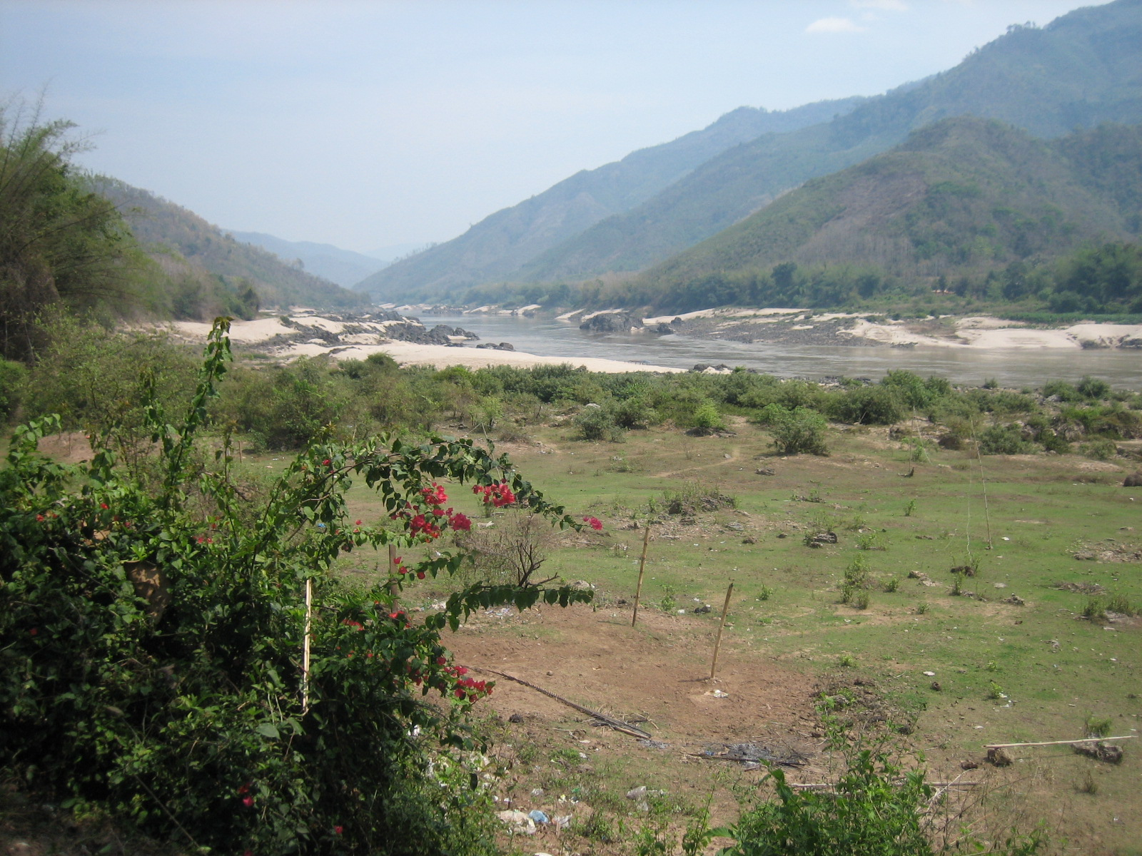 Xayaburi Mainstream Mekong Dam